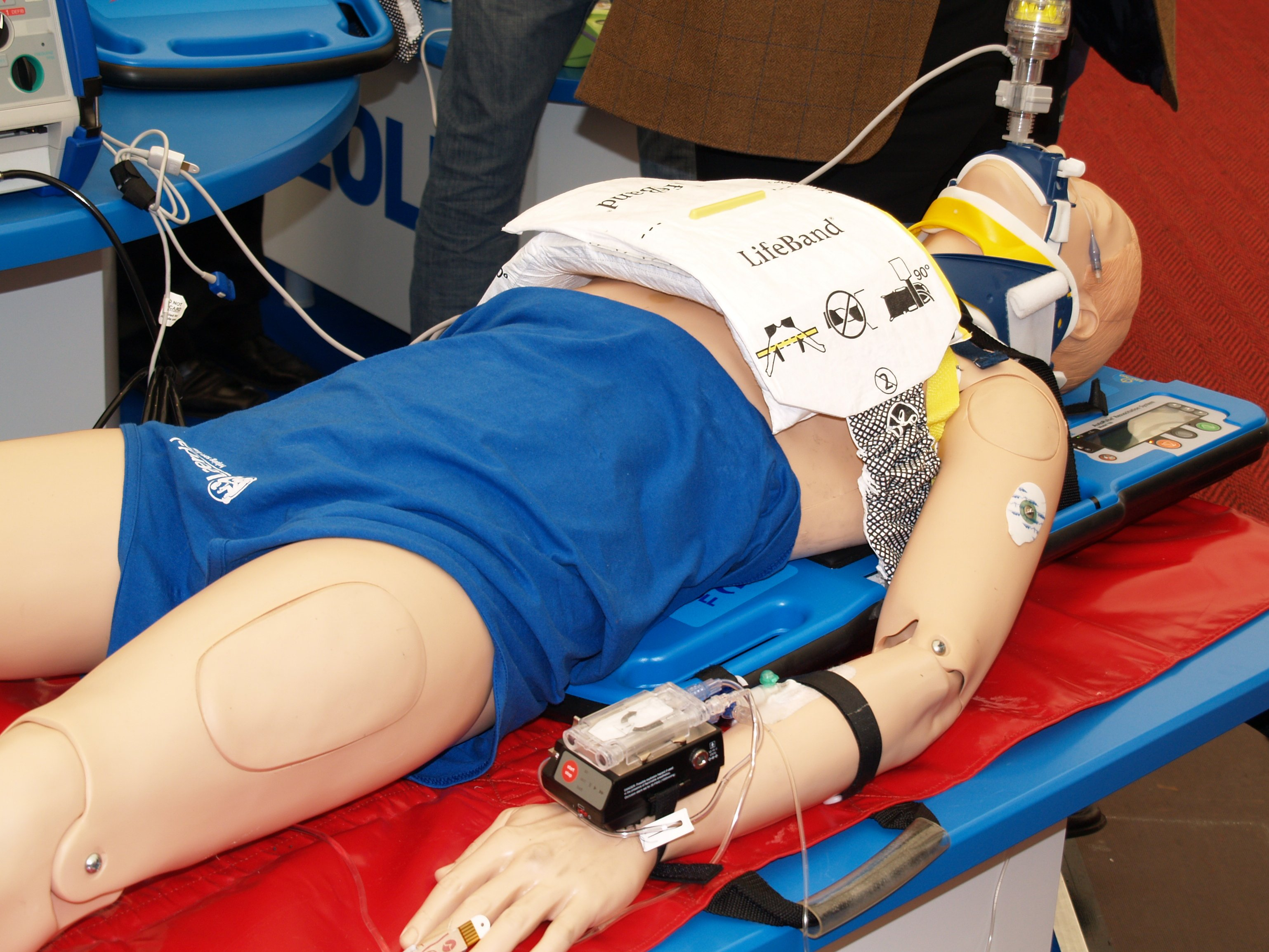 Mechanische Reanimationshilfe (AutoPulse), gesehen auf der Rettmobil 2007